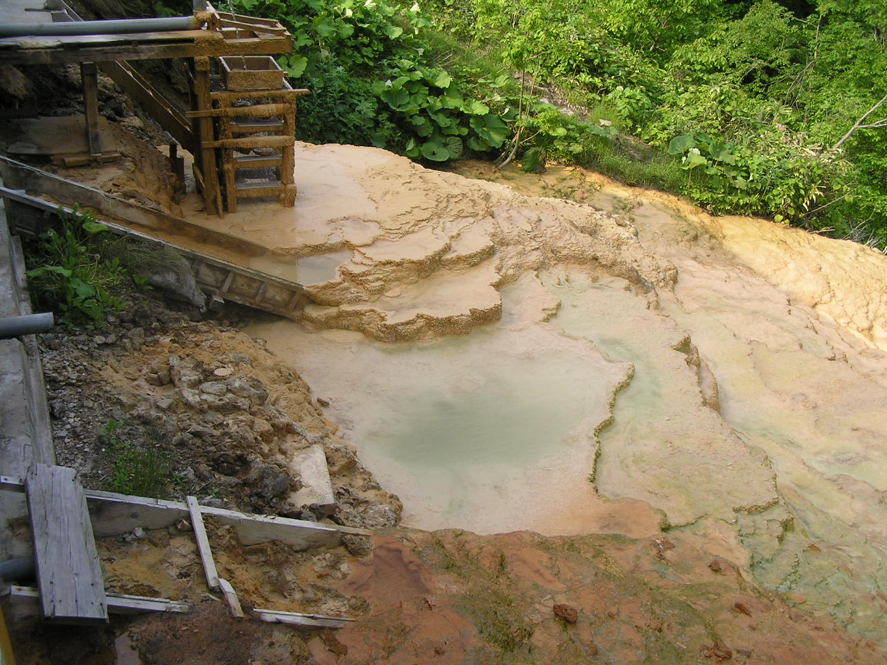 二股ラヂウム温泉